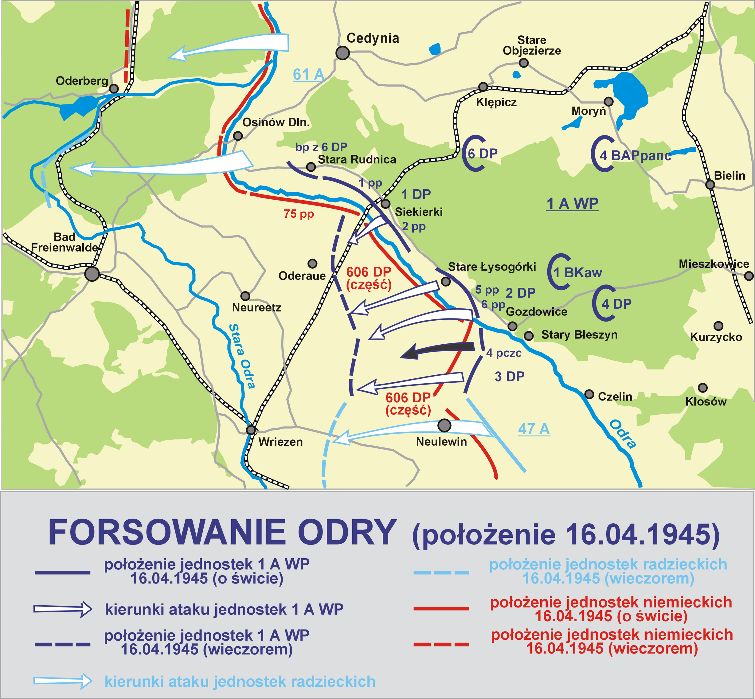 Forsowanie Odry położenie 16.04.1945